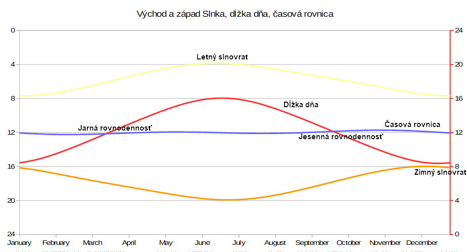 Východ a západ Slnka, denné svetlo, časová rovnica